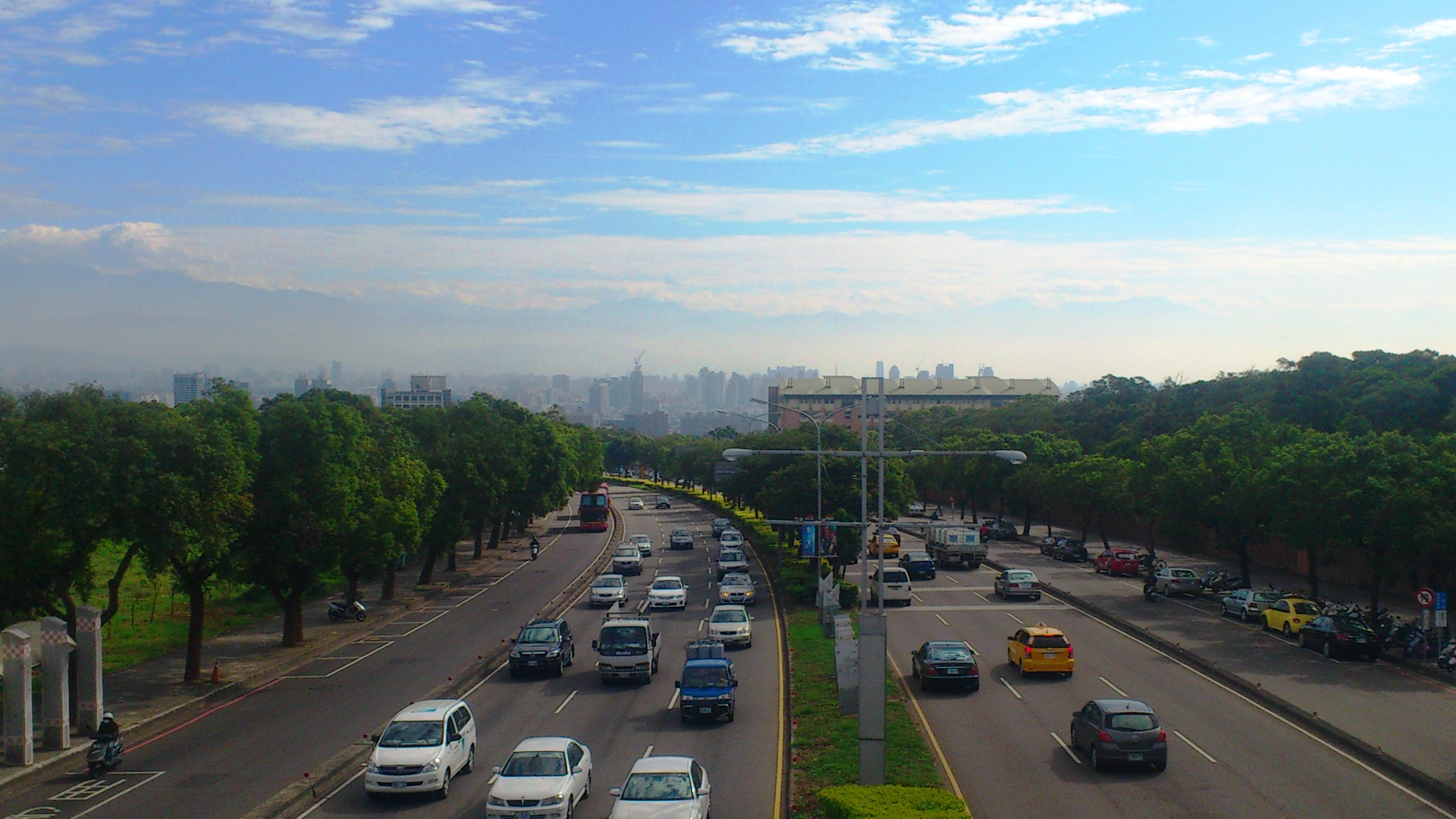 東海別墅附近的台中港路